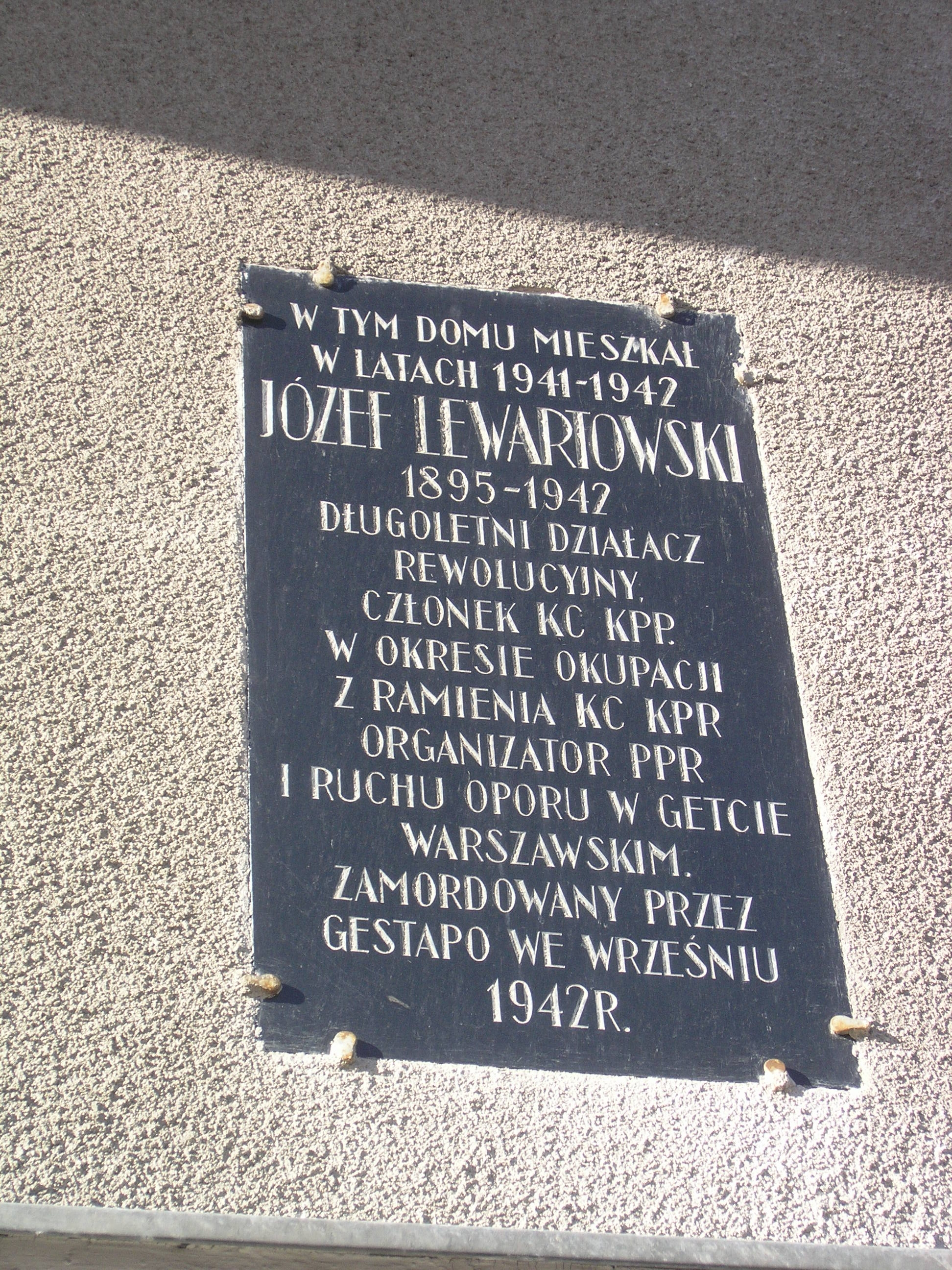 Tablica upamiętniająca Józefa Lewartowskiego przy ulicy Ogrodowej 10/26 w Warszawie, gdzie mieszkał w latach 1941-1942. Tablica została zdemontowana w czerwcu 2016